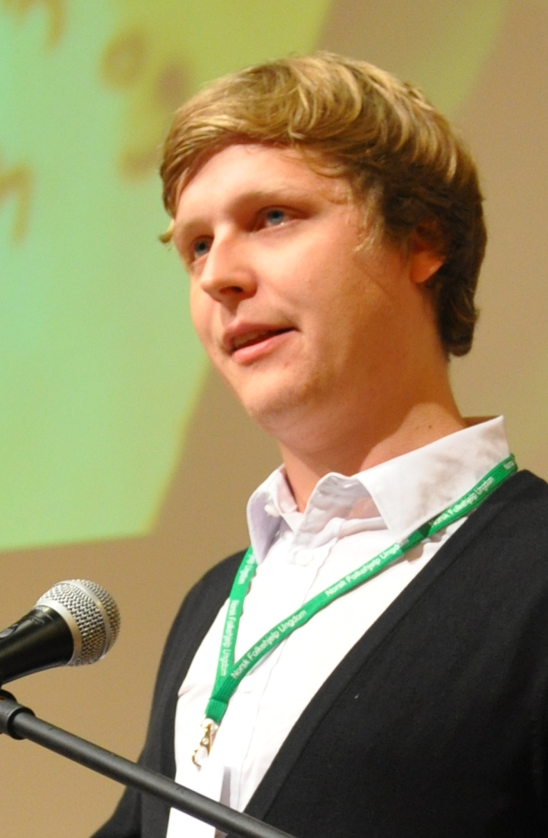 Åsmund Aukrust, nestleder i AUF